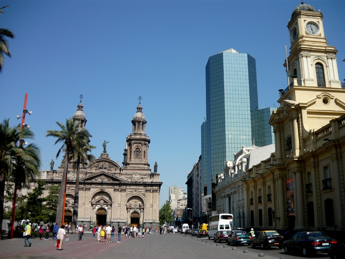 Plaza Armas Santiago Chile.